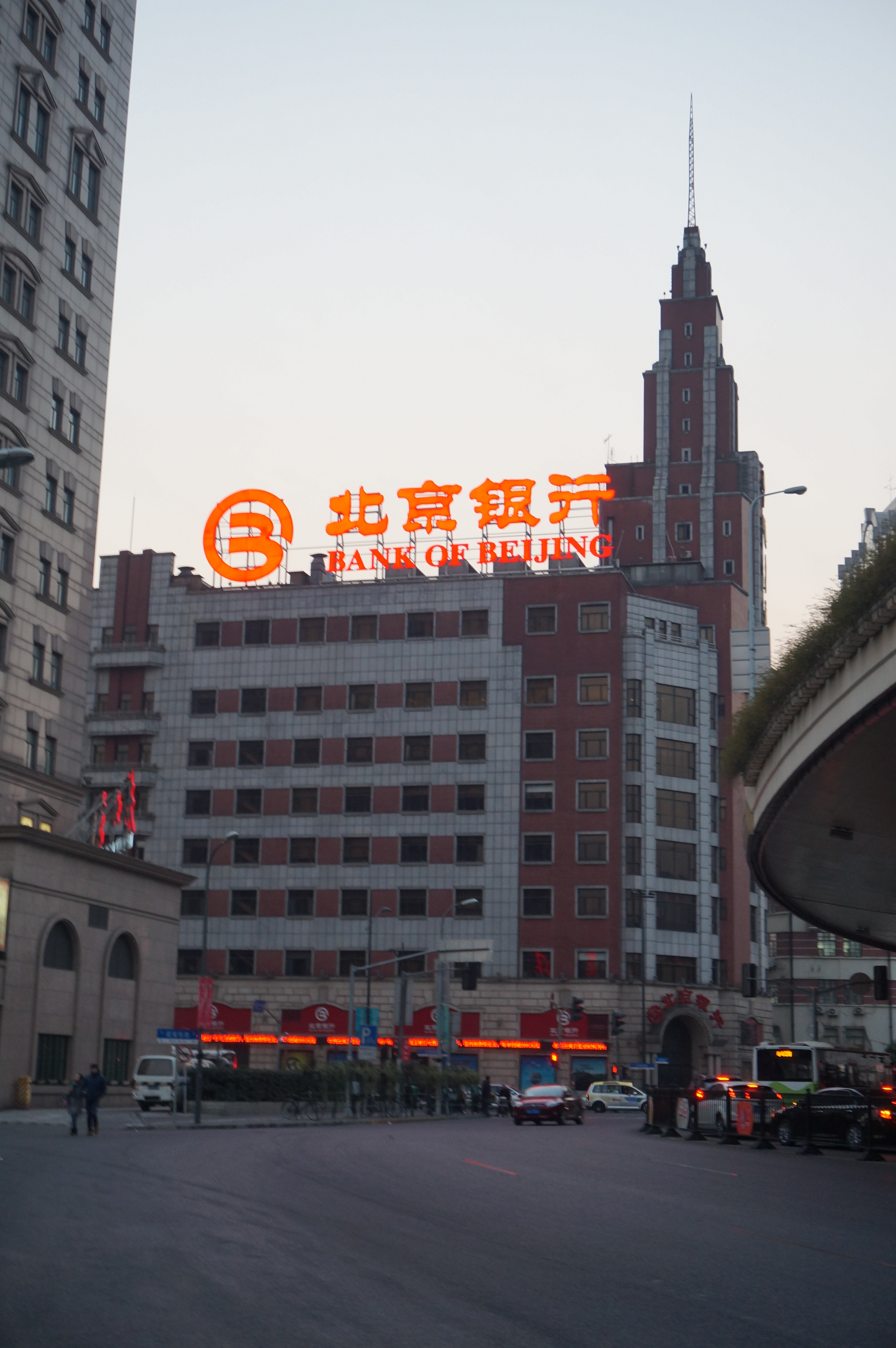 第二批上海市优秀历史建筑 河南南路16号 中汇大楼 中汇大厦